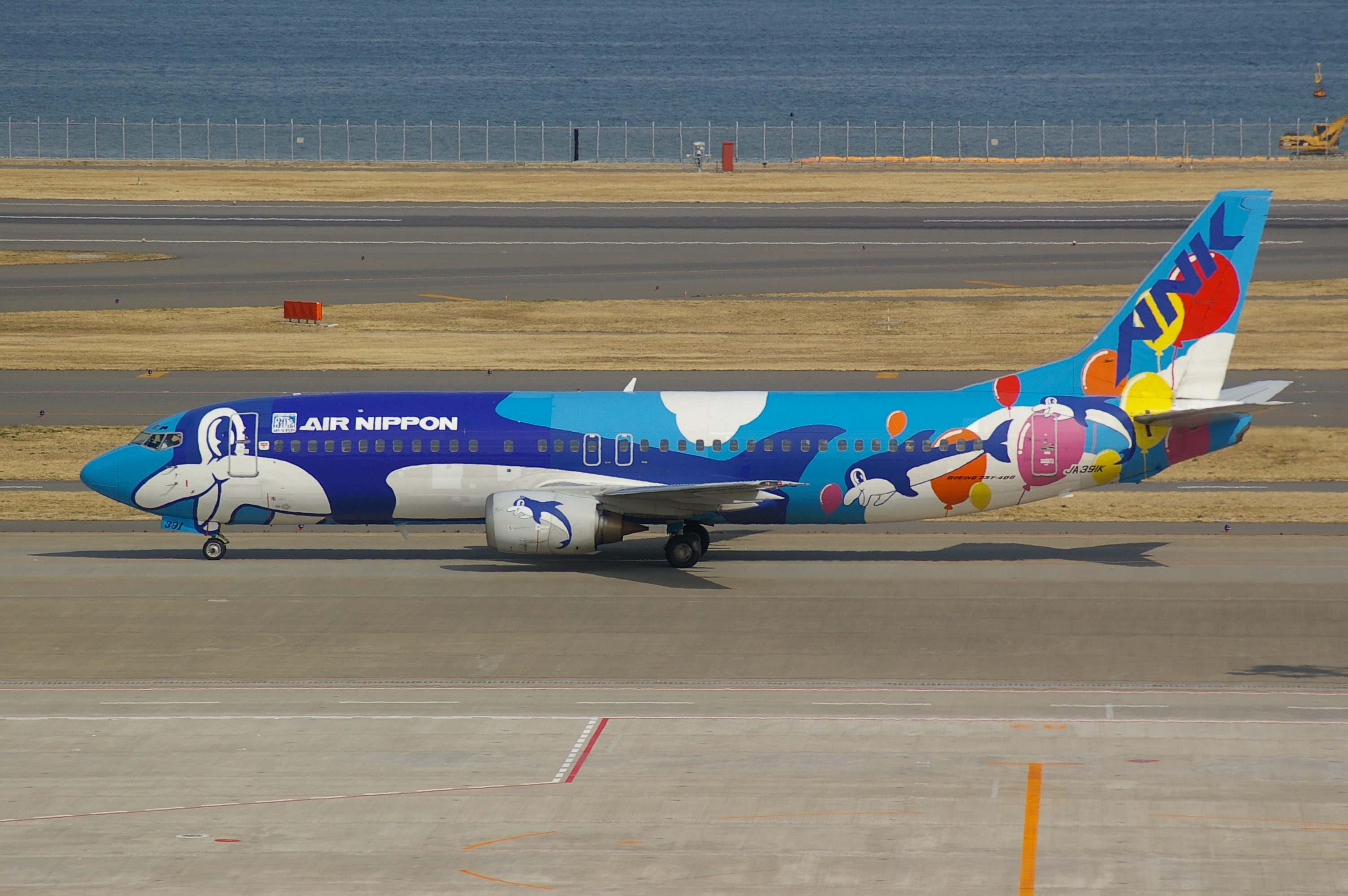 2005年2月21日 羽田空港第二ターミナル展望デッキにて撮影。 ANK 737-400 JA391K アイランドドルフィン